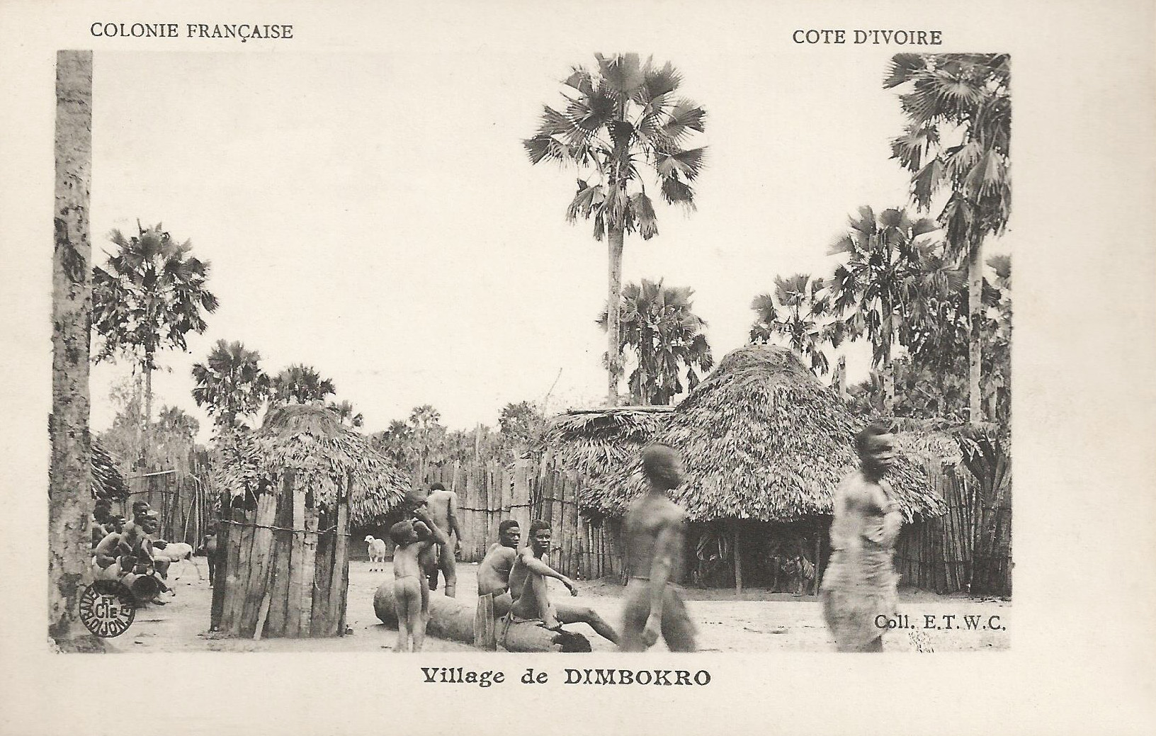 Village de Dimbokro. éditeur Bauer, Marchet et Cie (logo à gauche, utilisé de 1909 à 1916), coll. E.T.W.C. Colonie française. Côte d'Ivoire